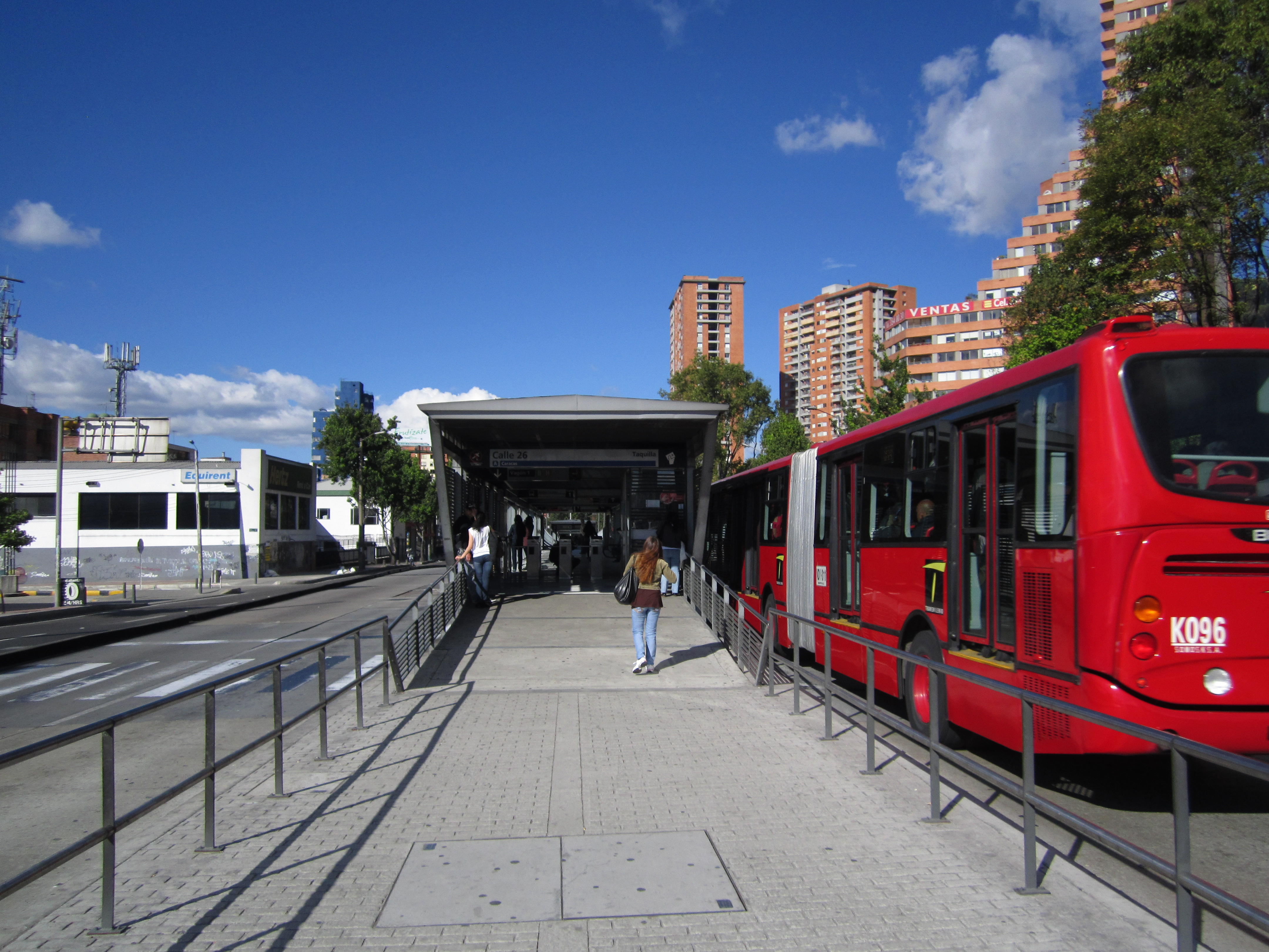 Estación Calle 26 de Transmilenio.